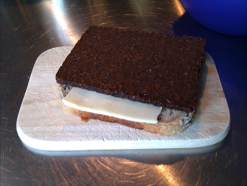 Amagermad med en skive ost imellem